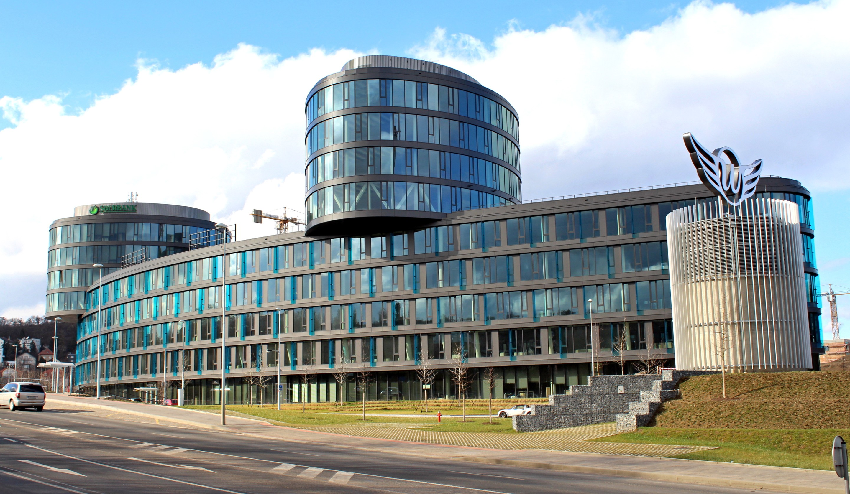 Rezidence Waltrovka